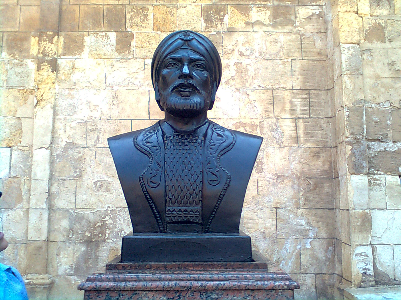 صورة تمثال سيف الدين قطز من داخل قلعة صلاح الدين الأيوبى